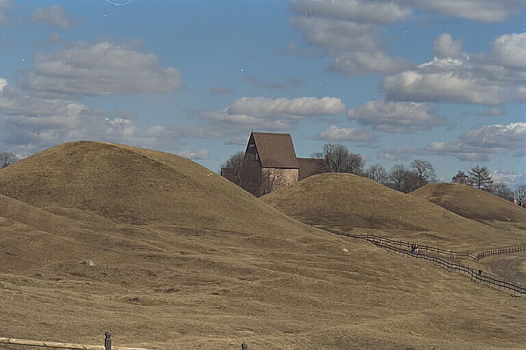 Kungshögarna med Gamla Uppsala kyrka. Motiv: Uppsala högar Nyckelord: Raä-Fastigheter Kategori: Hög Kungshögarna med Gamla Uppsala kyrka.